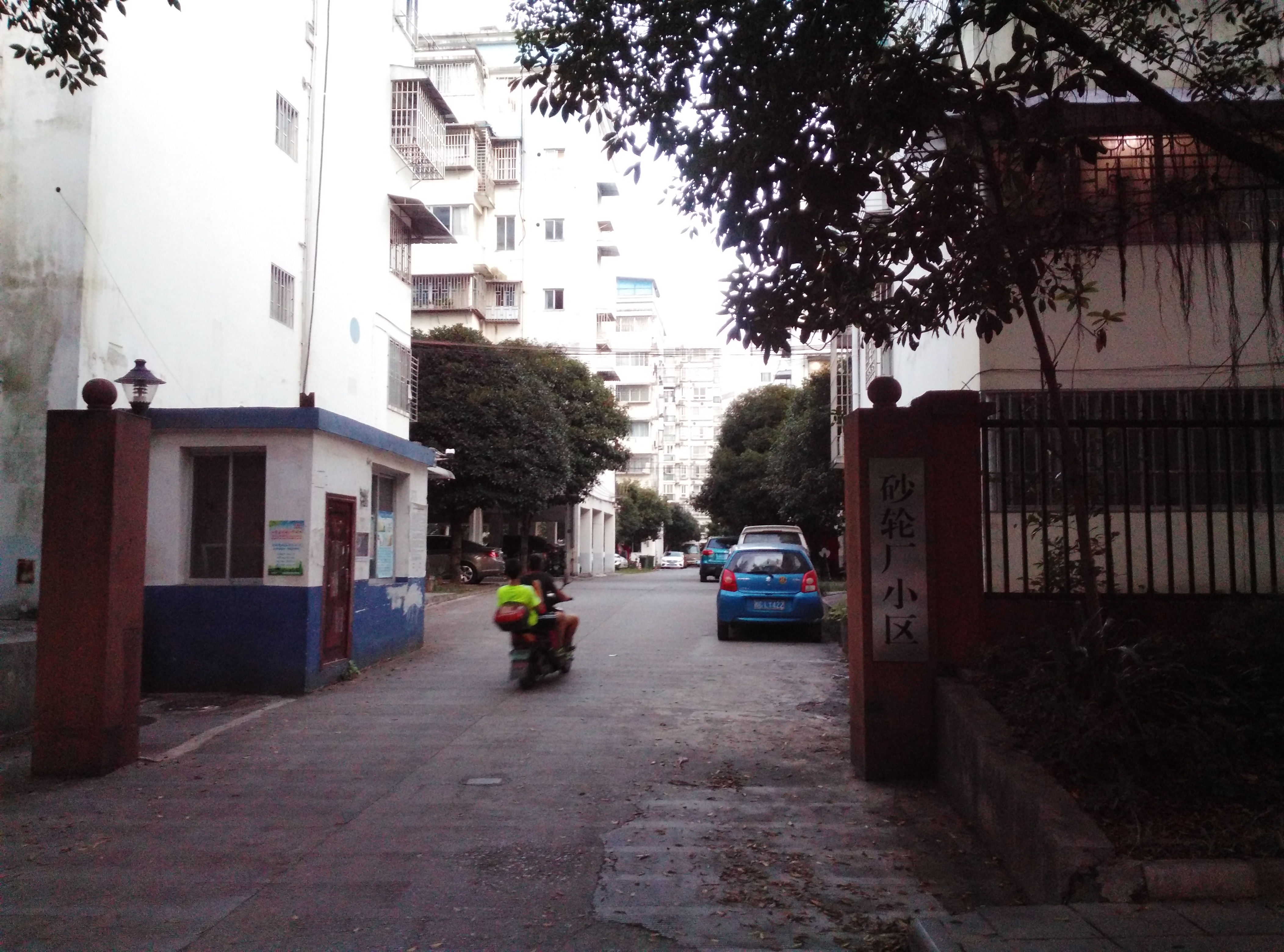 桂林砂轮厂小区